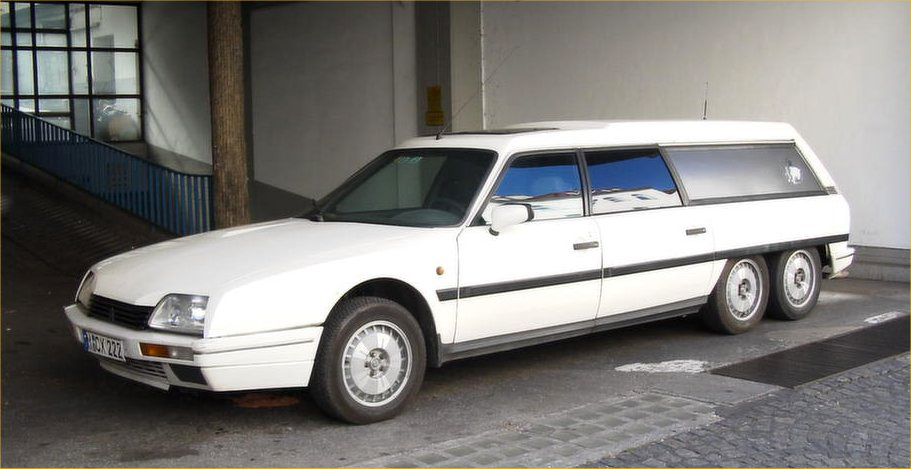 Mike's Garage Loadrunner, basierend auf einem Citroen CX Break Baujahr 1990